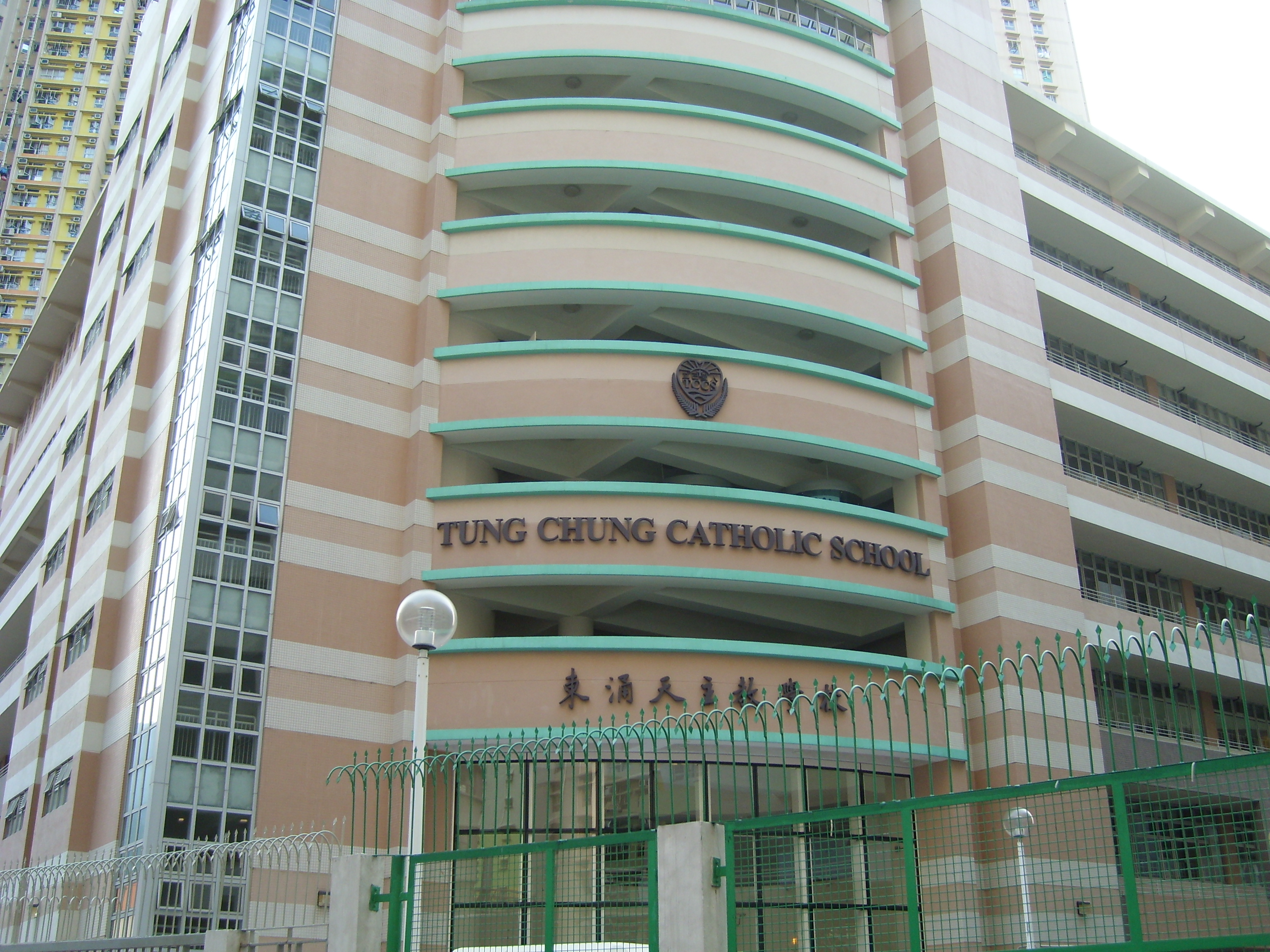 中文（香港）: 東涌天主教學校中學部